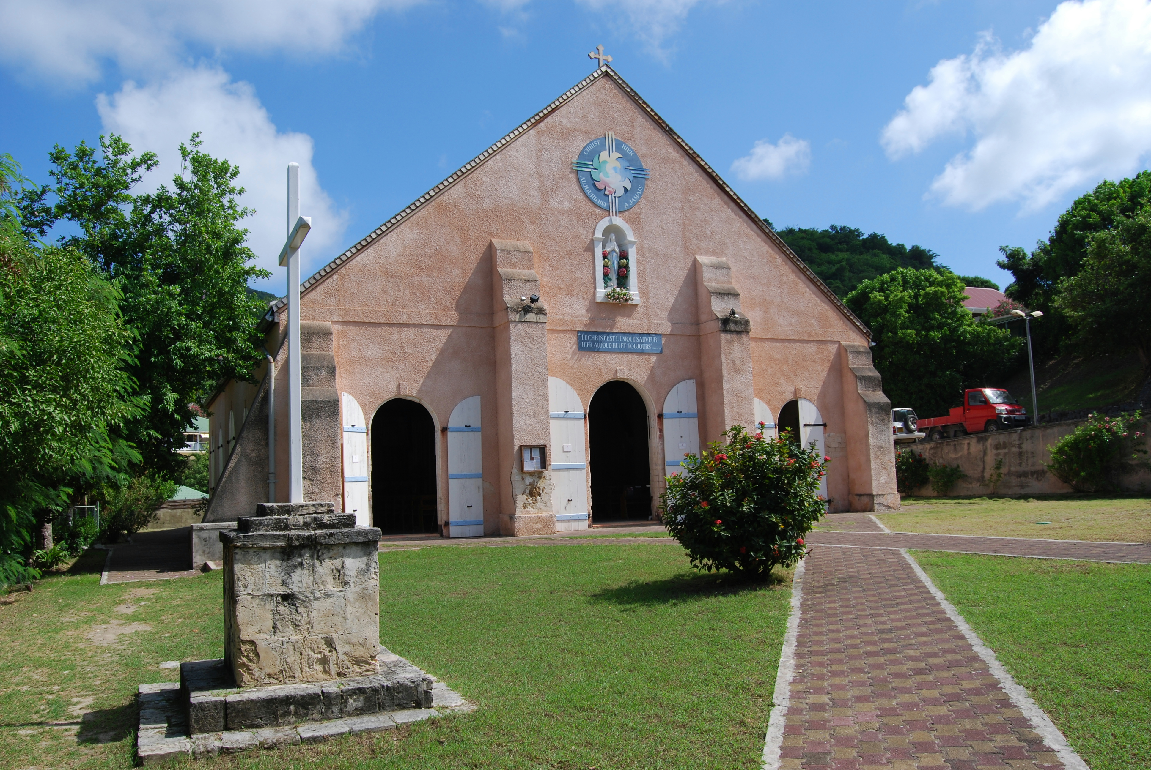 Église de Lorient, Quartier de Lorient (inscrit, 1995)